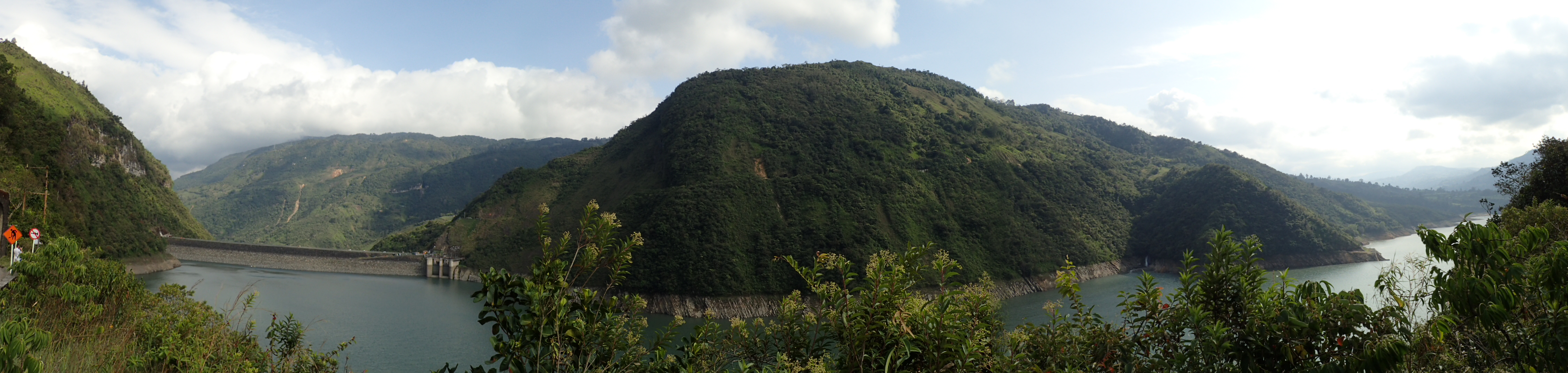 Esta fotografía fue tomada en el municipio colombiano con código 25293.